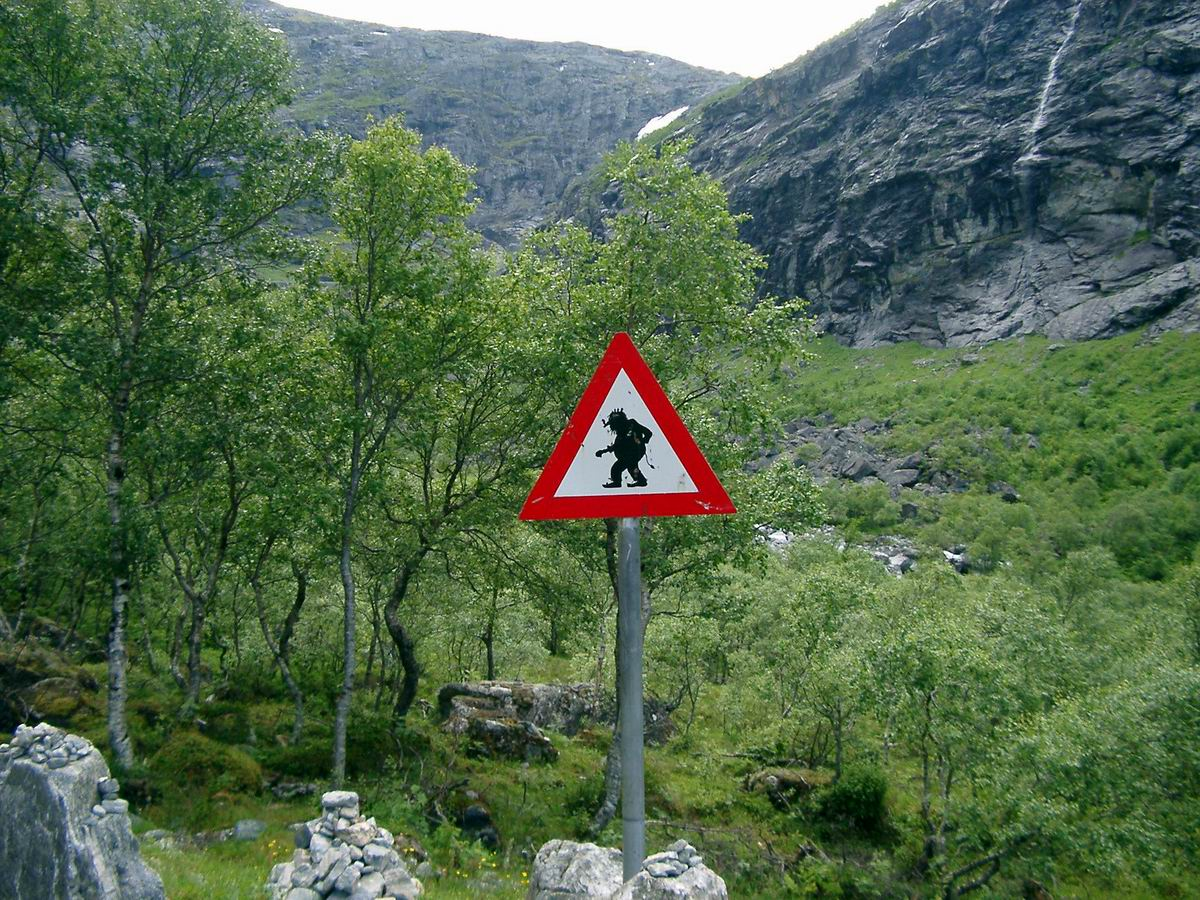 Troll Norwegen